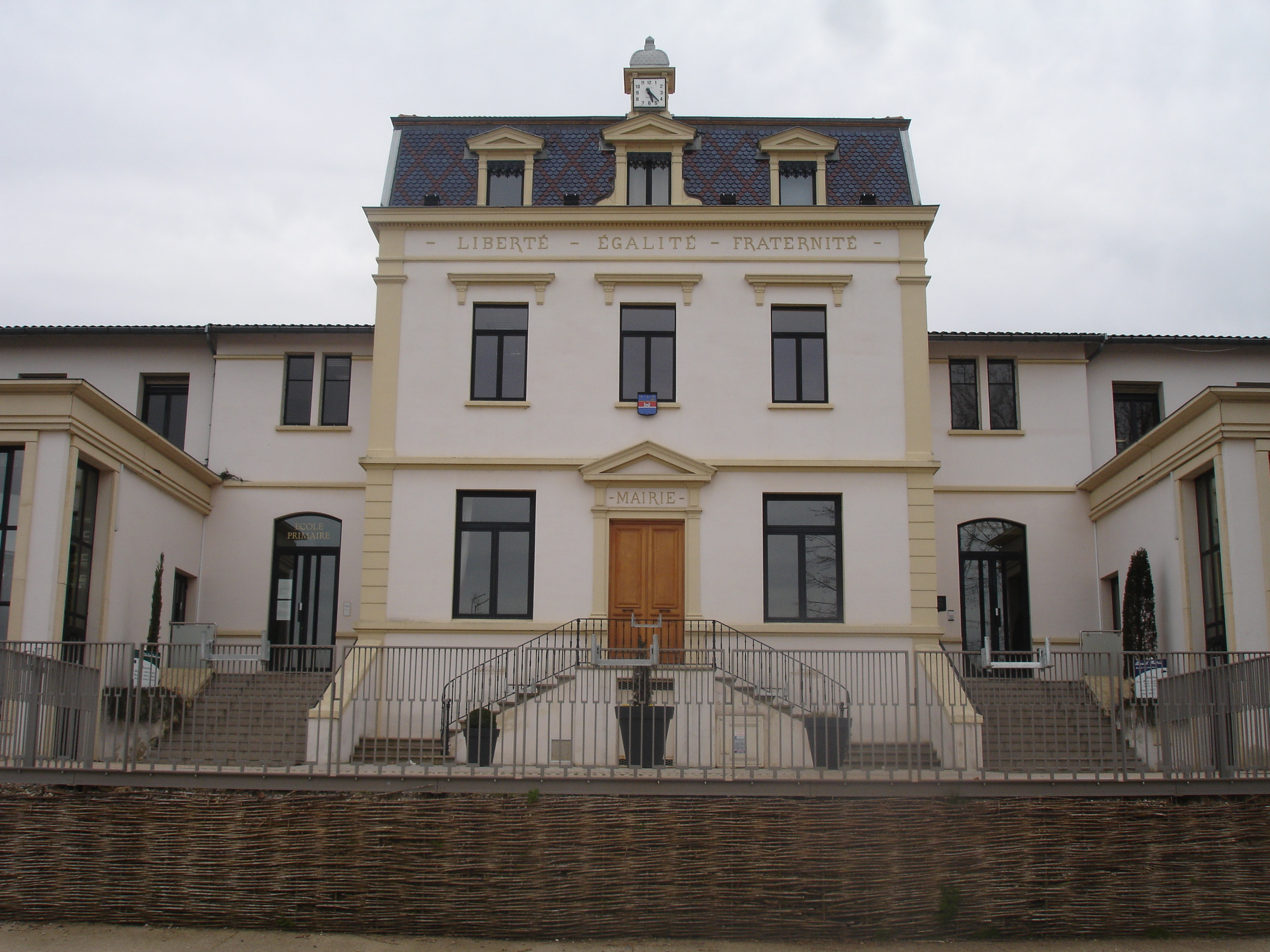 Charly (69) : La mairie